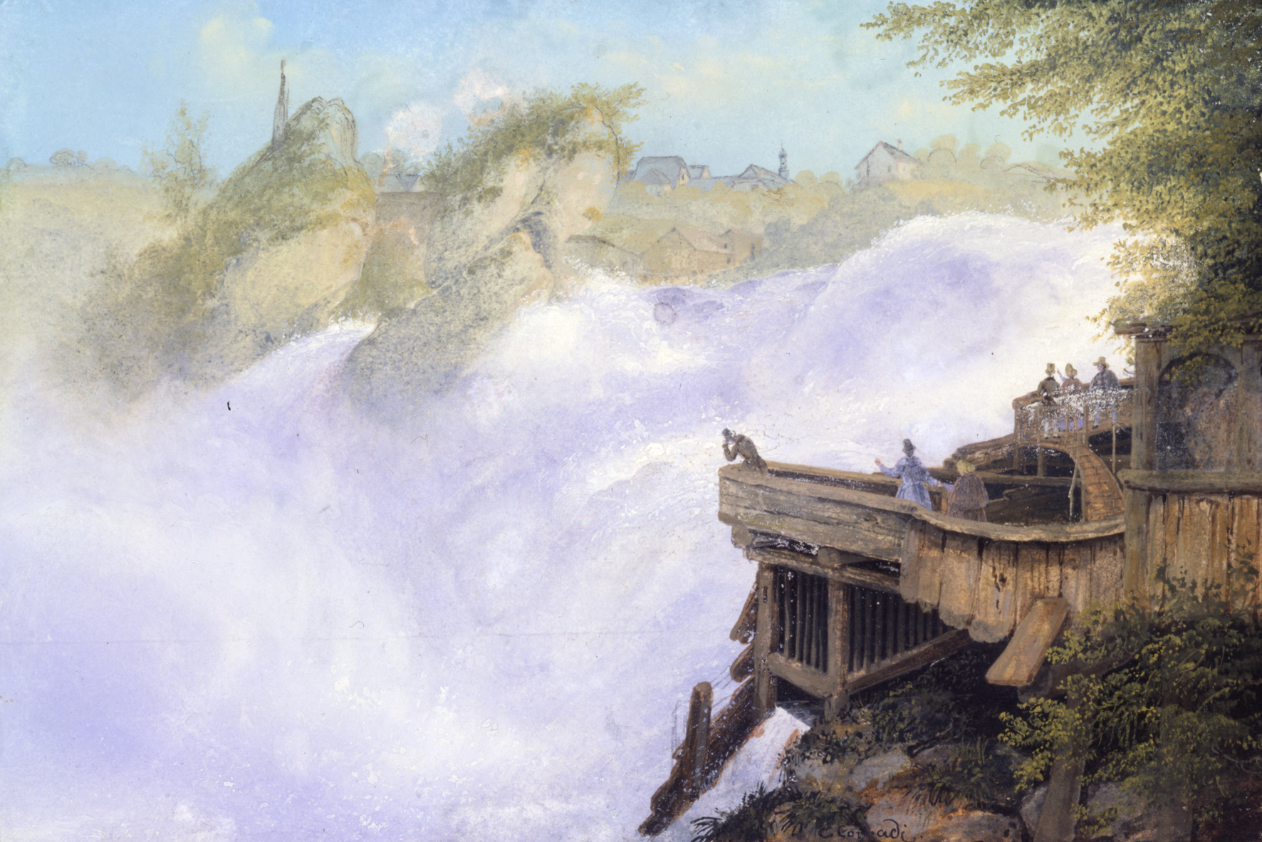 Der Rheinfall bei Schaffhausen. 1860. Gouache. 13.8 x 20.2 cm